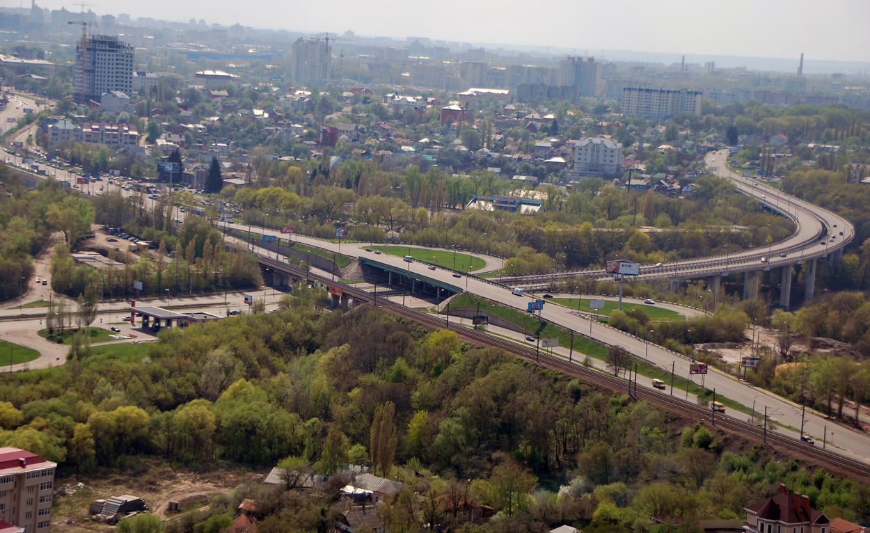 Дорога в никуда (развязка в Воронеже)